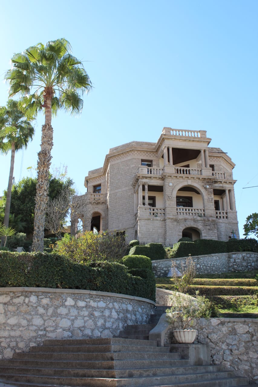 Casa del Cerro en la ciudad de Torreón, Coahuila